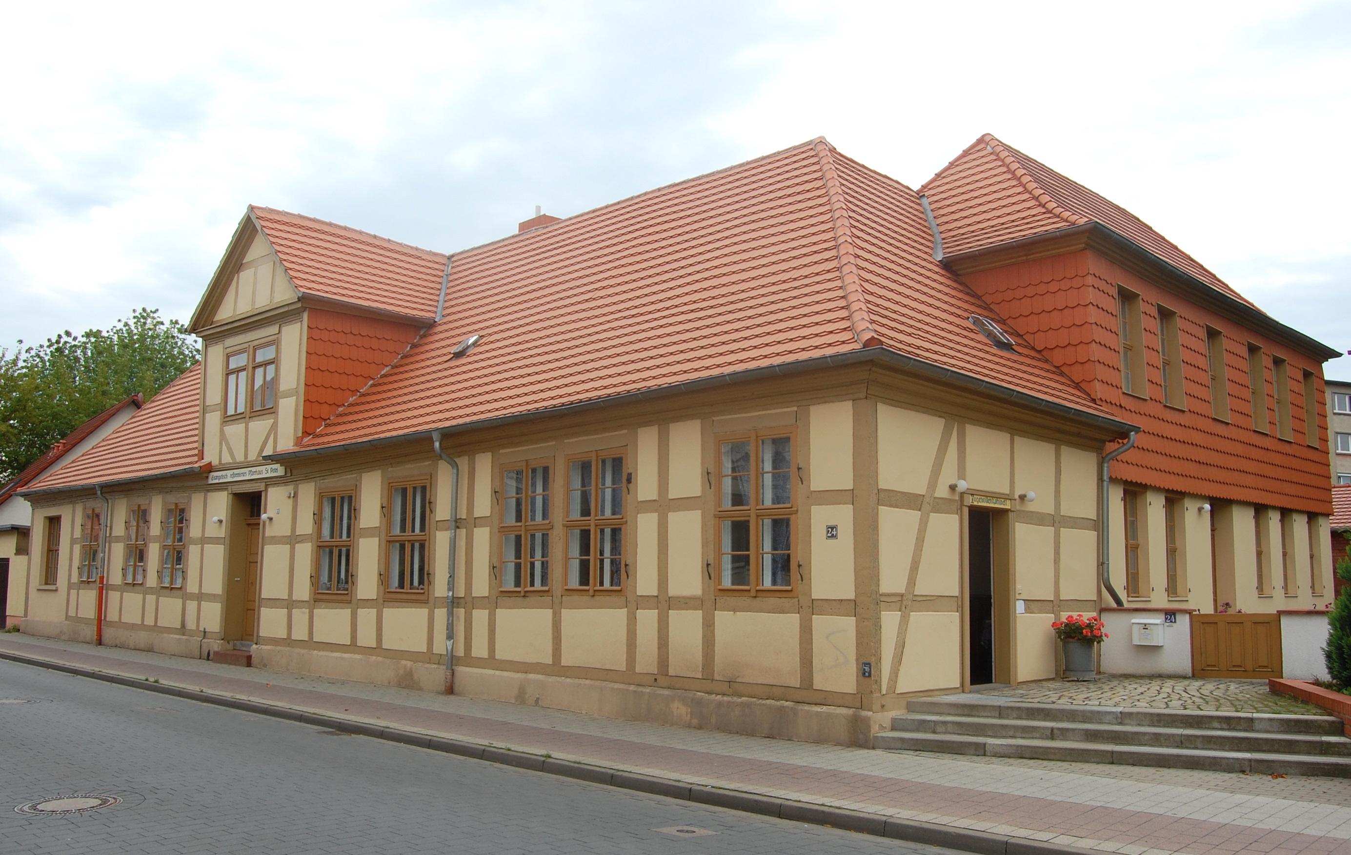 Pfarrhaus der Sankt-Petri-Kirche Burg (bei Magdeburg)